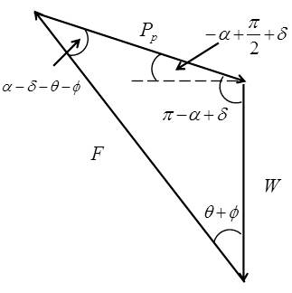 受働土圧時の連力図